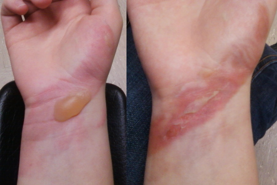 Eine Verbrennung des Grades 2a ist zu Beginn sehr schmerzhaft. Sollte eine Blase wie diese auf dem Bild links vorliegen, unbedingt zum Arzt gehen und aufstechen lassen (Niemals selbst aufstechen!). Danach ein Gel zur Verhinderung der Narbenbildung benutzen, da sich die verbrannte, aufgerissene Haut (Bild rechts) nur schwer regenerieren kann.